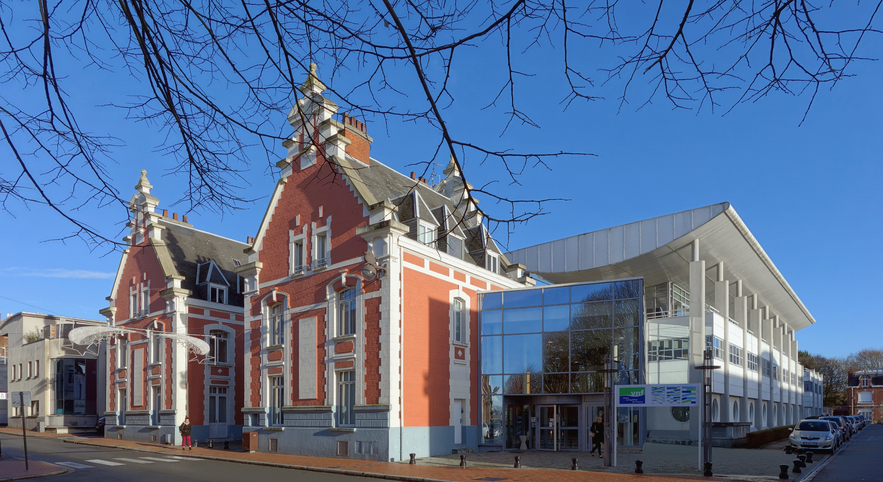 Le siège des Voies Navigables de France à Béthune.